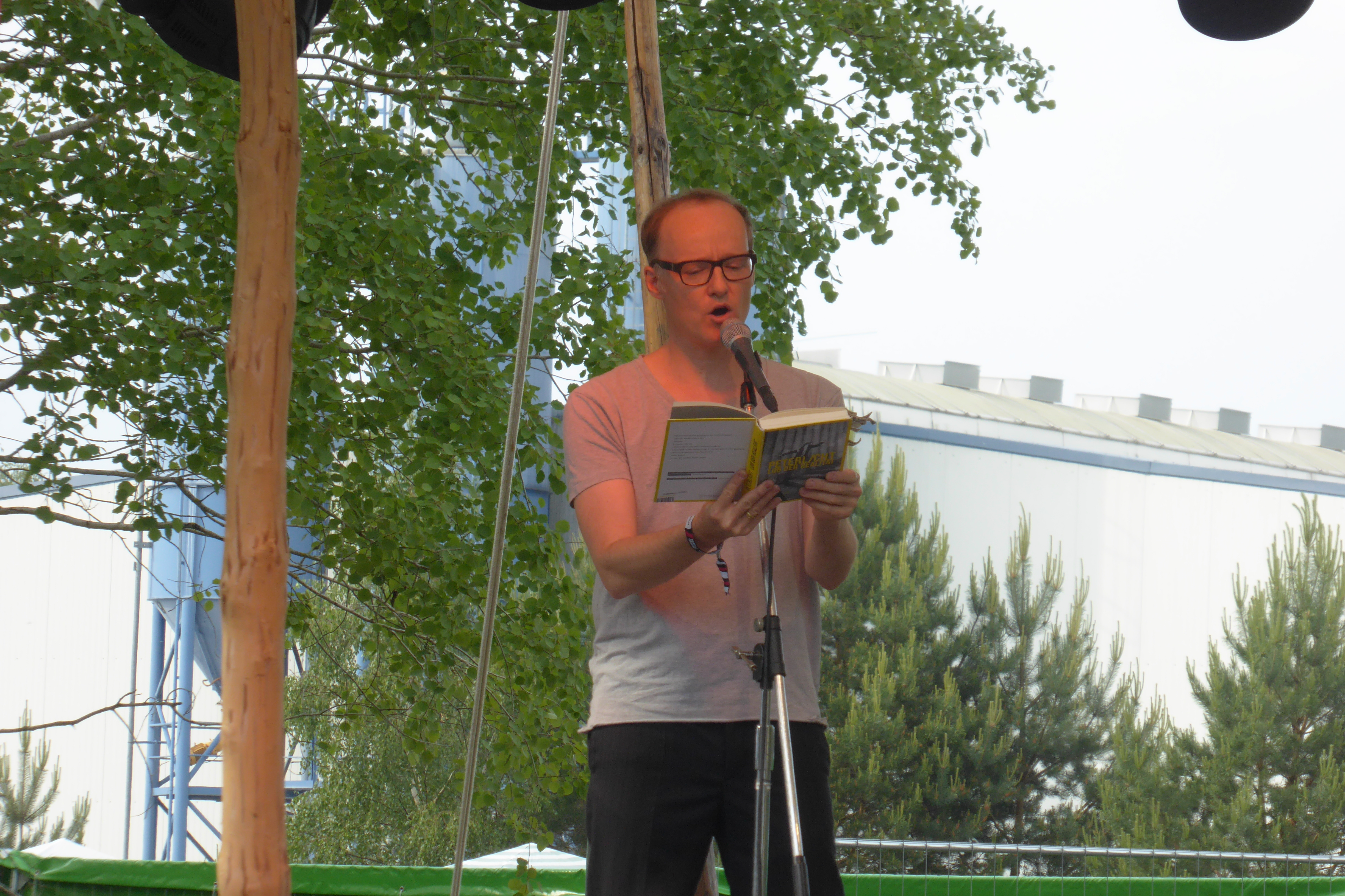 Peter Licht beim Immergut Festival 2016